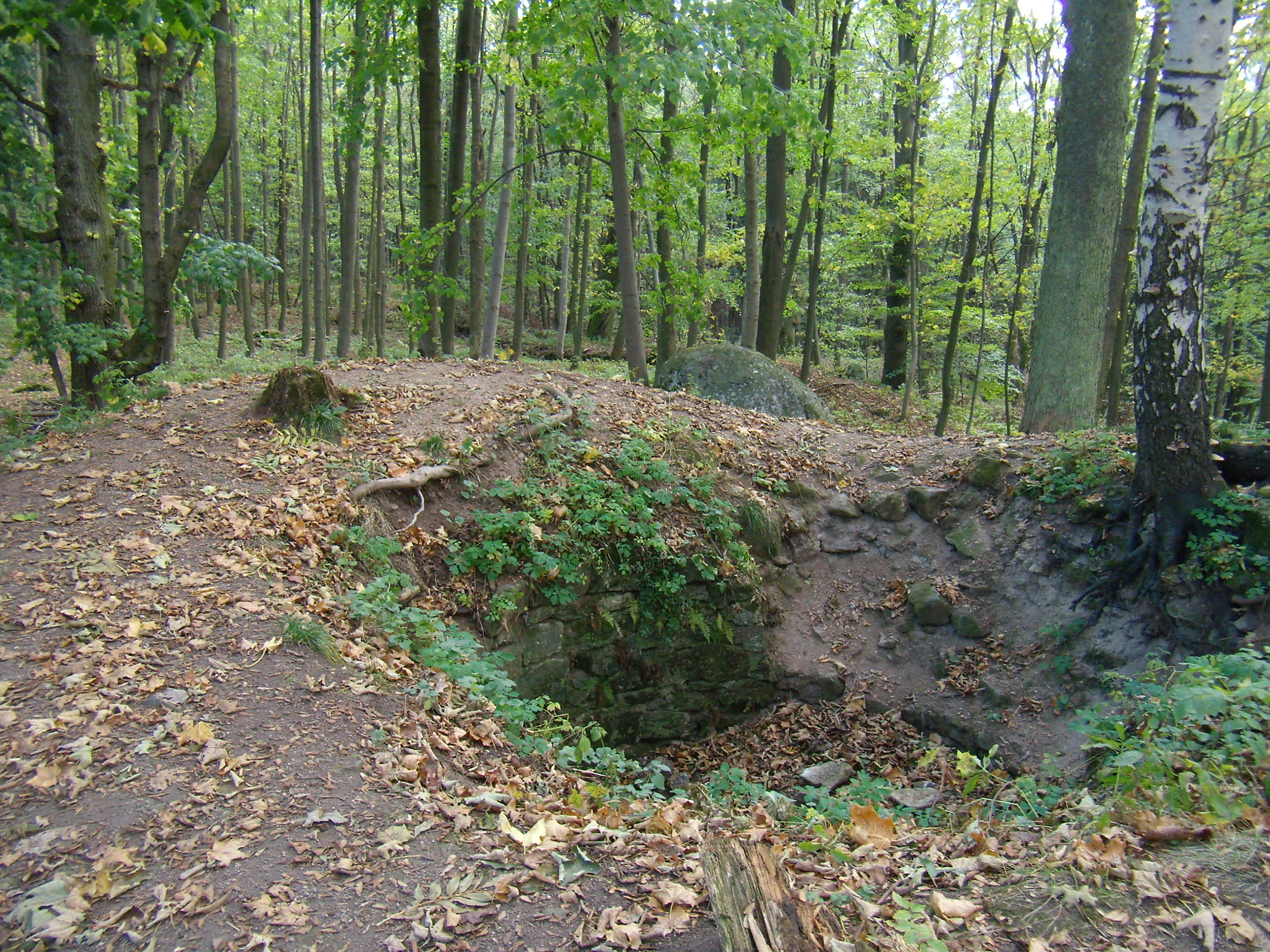 Potštejn